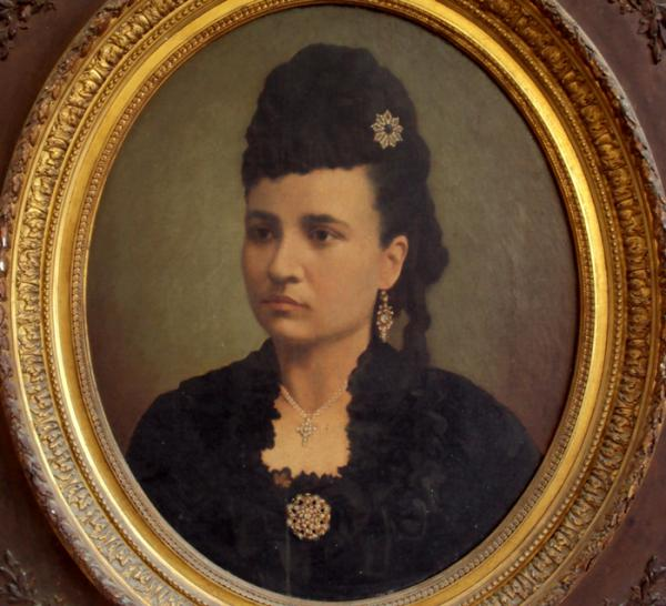 Baronesa